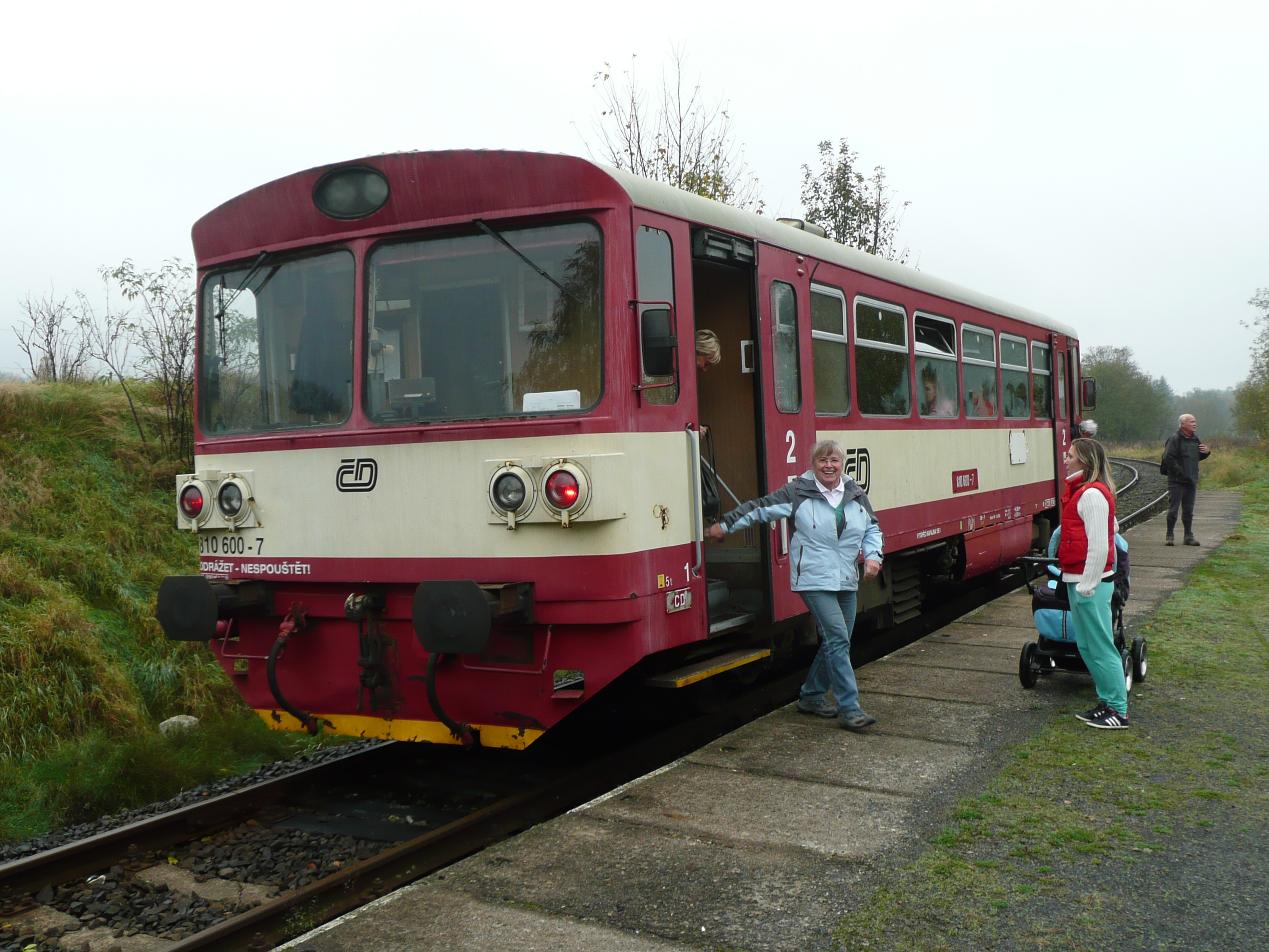 Regionalbahn an dem Haltepunkt in Brtníky